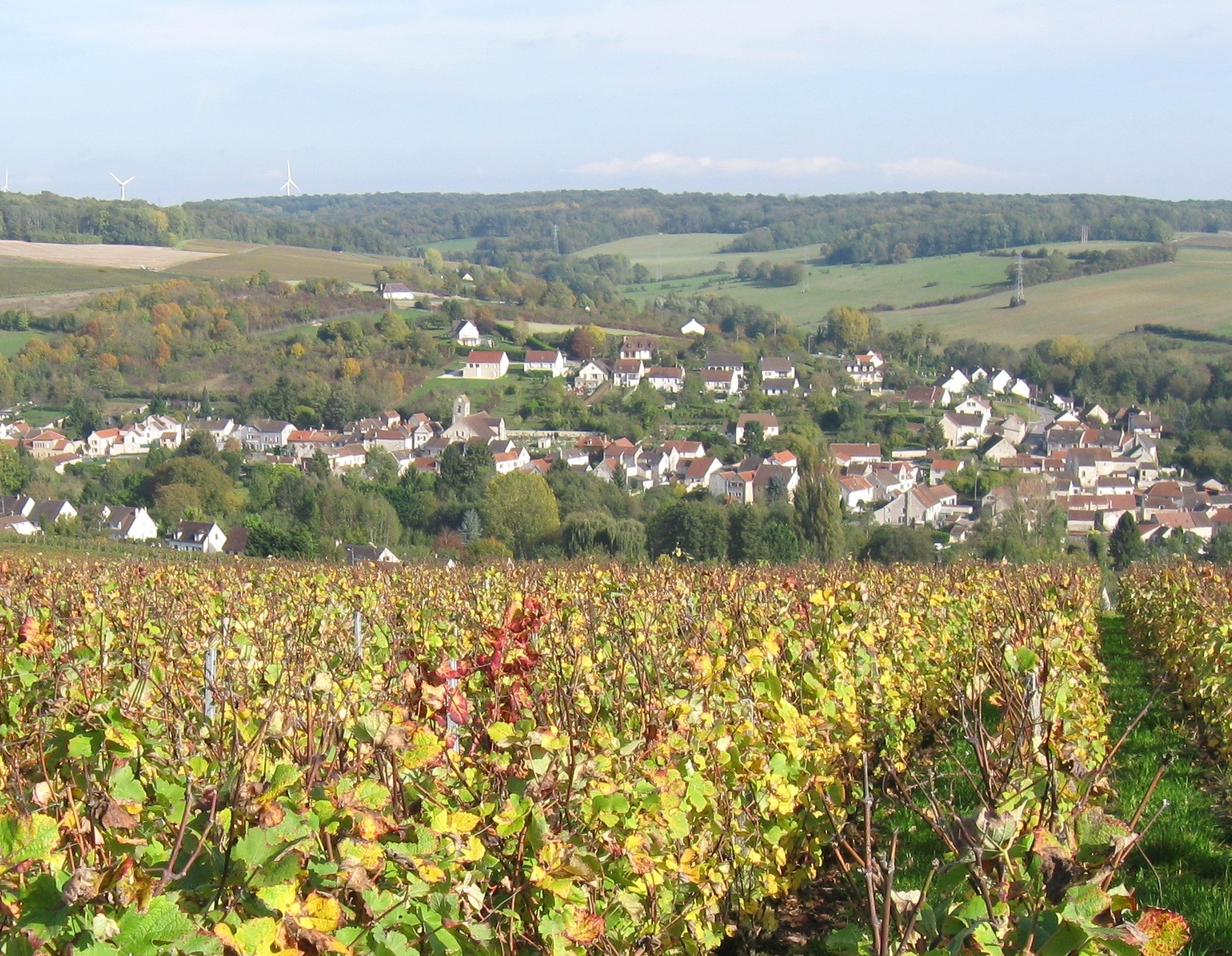 Villiers-Saint-Denis. (département de l'Aisne, région Picardie).